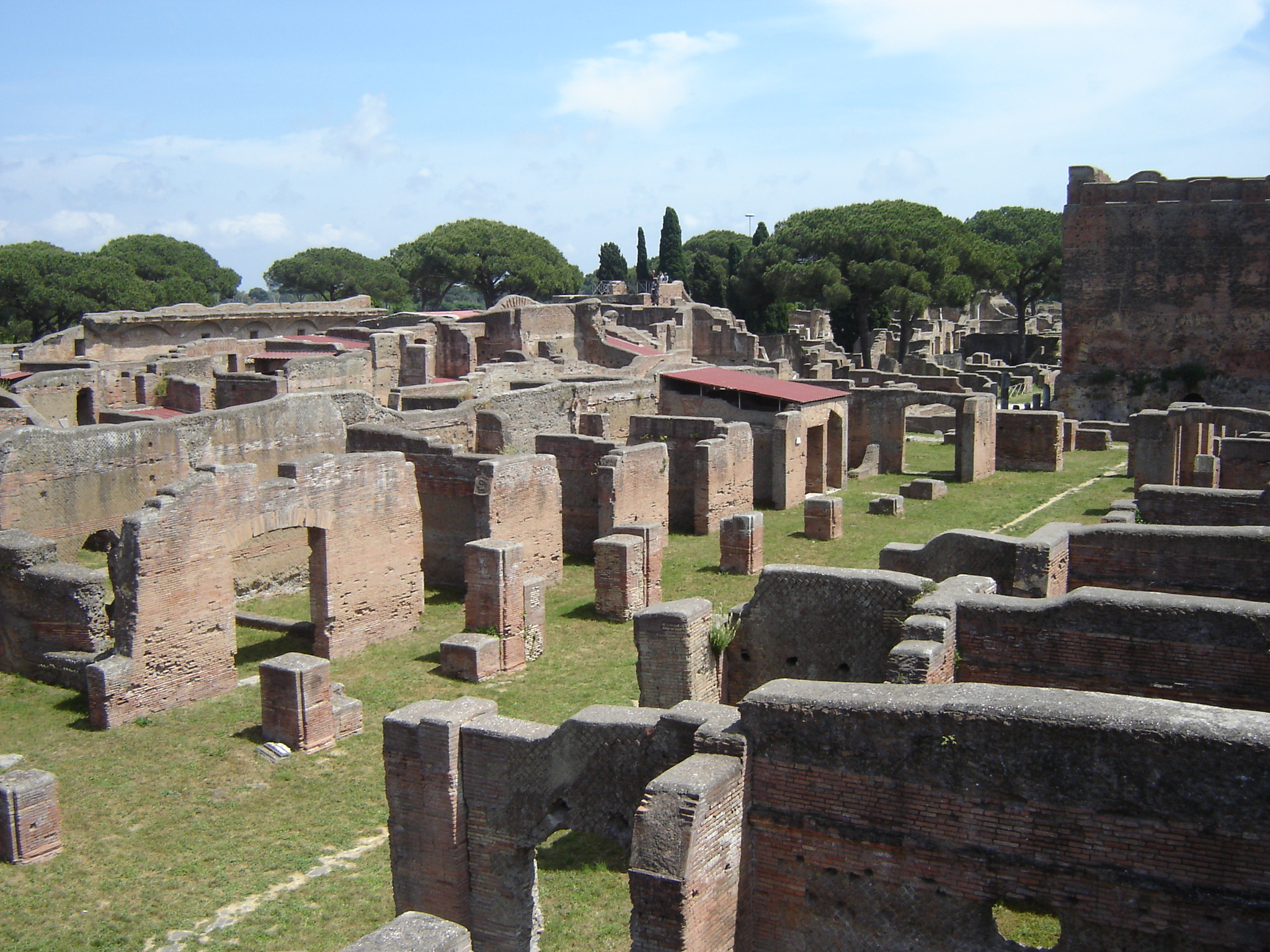 Ostia